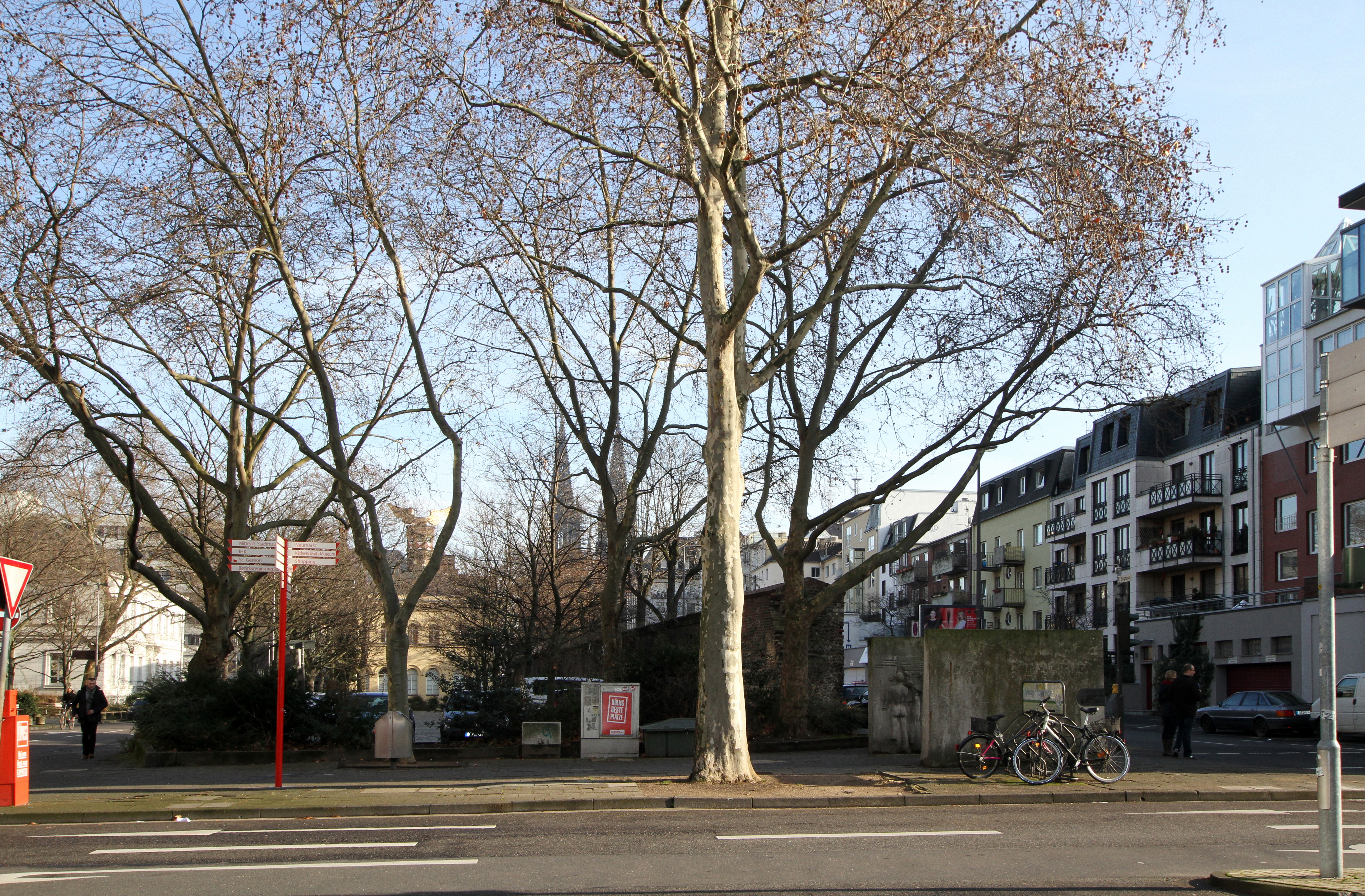 Köln Altstadt-Nord, Kreuzungsbereich Auf dem Berlich, Burgmauer, Zeughaus- und Mohrenstraße